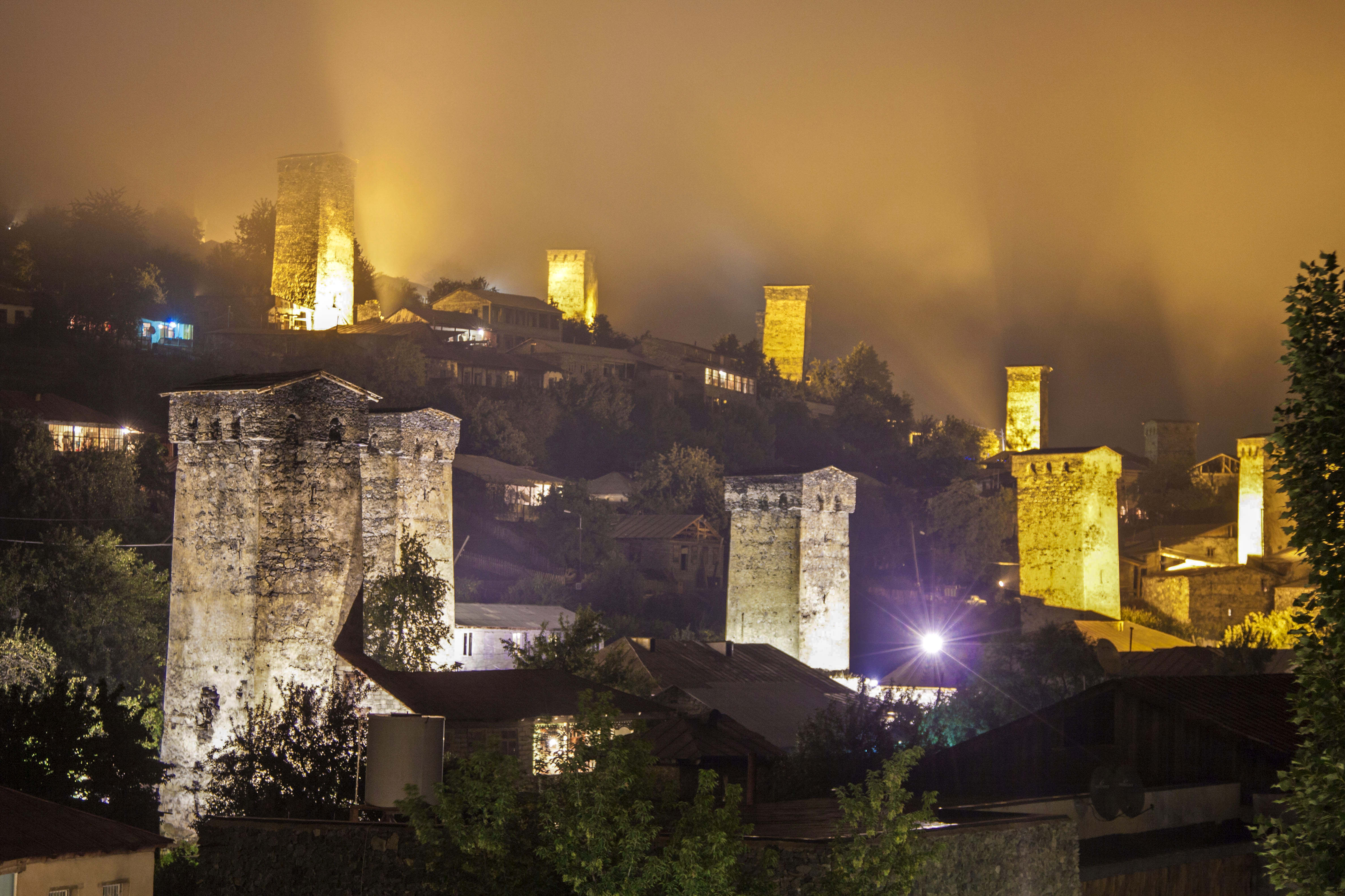 Mestia 2012 054